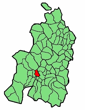 aipaturiko udalerriaren kokapena Nafarroa Beherean